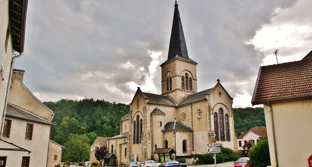 église St Denis